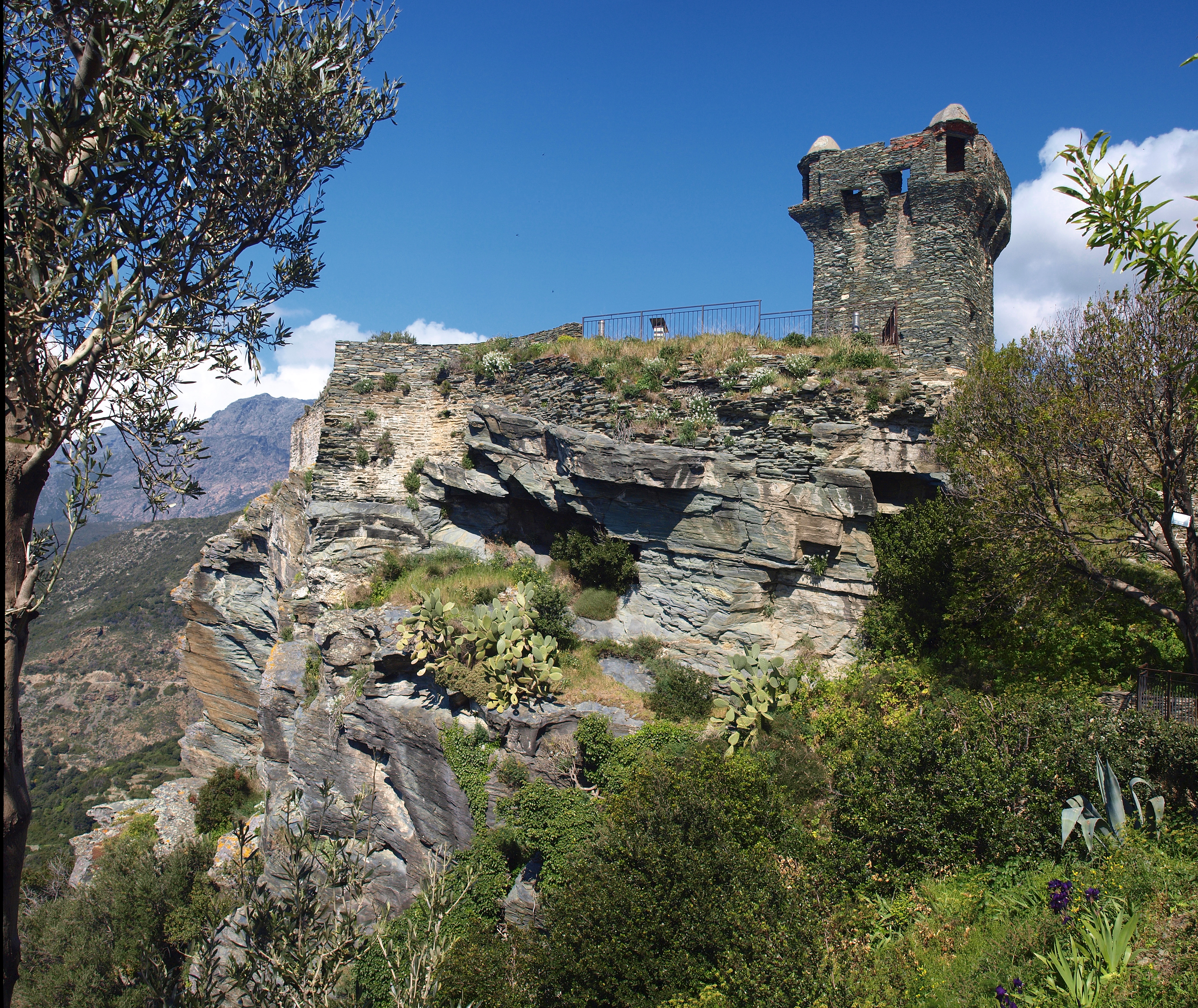 Nonza (Corsica) - Torra di Nonza